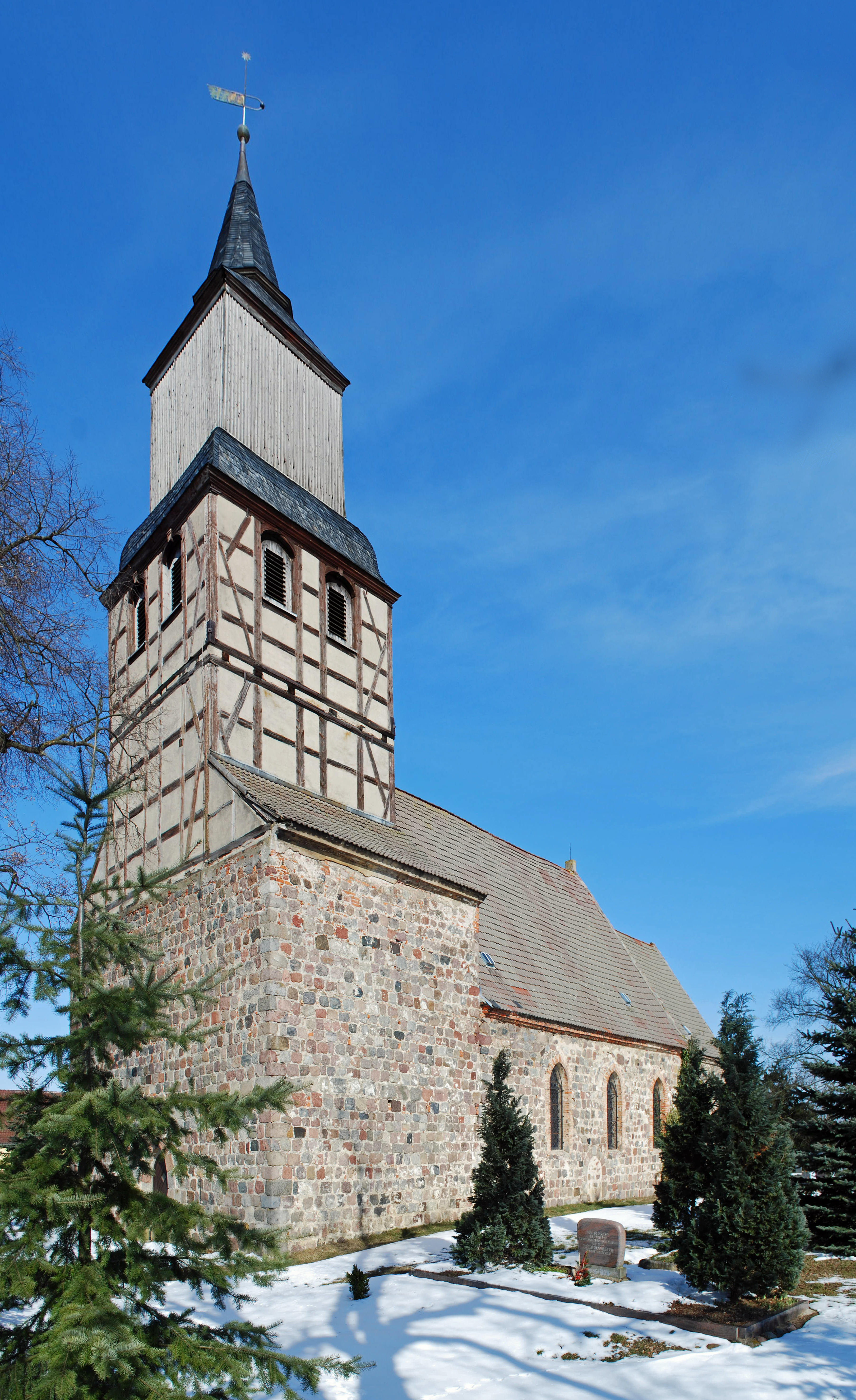 Gebäude und Denkmal in der Uckermark. (Altkreis Angermünde)